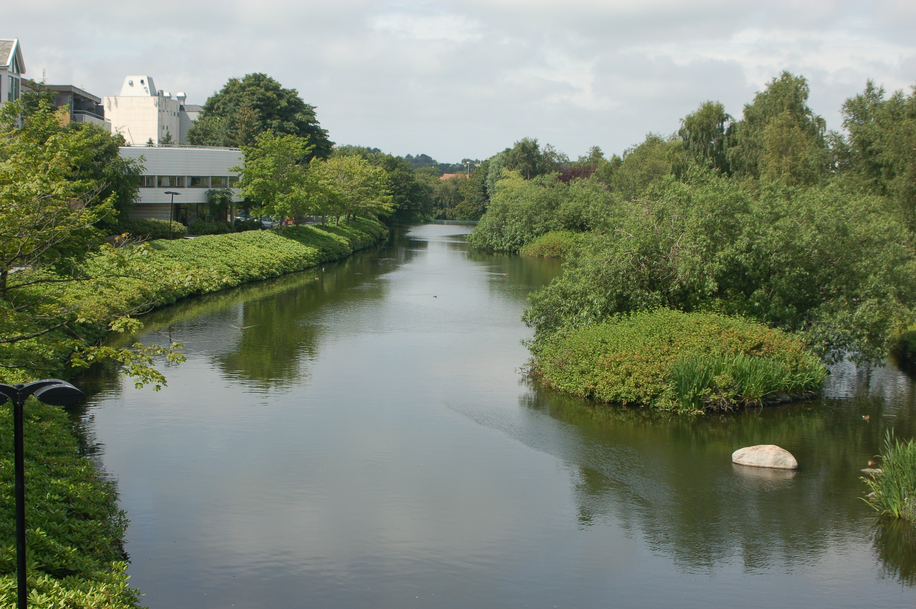 Mølledammen, Bryne, Rogaland, Norway